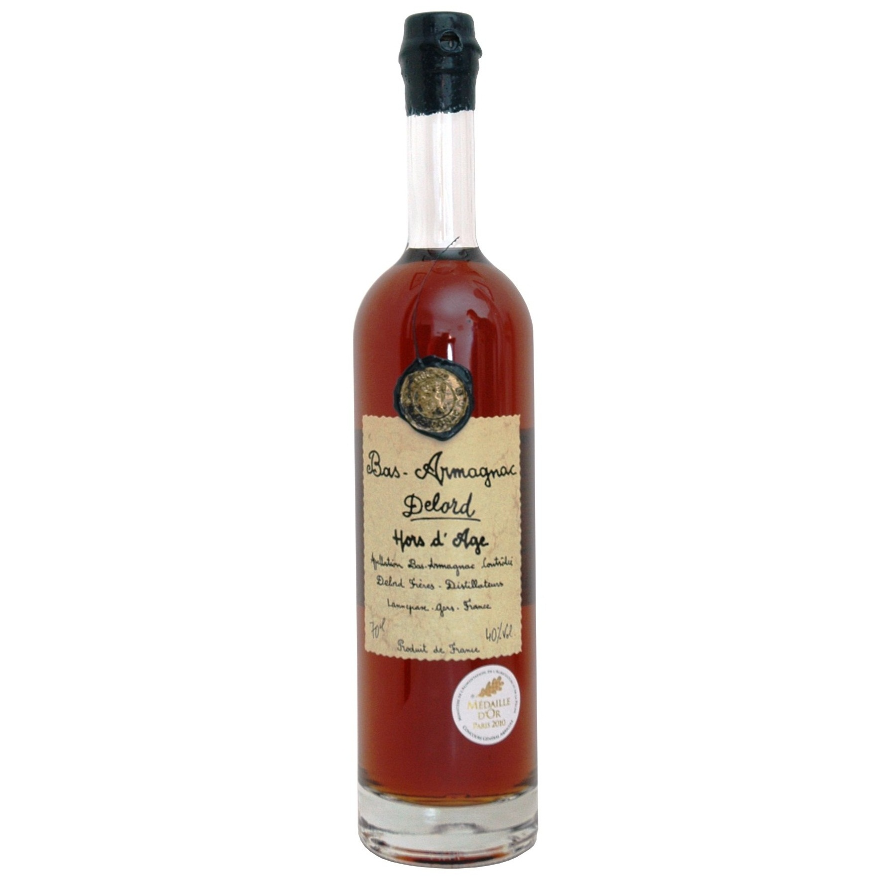 Bas - Armagnac Assemblage 25 ans d'Age